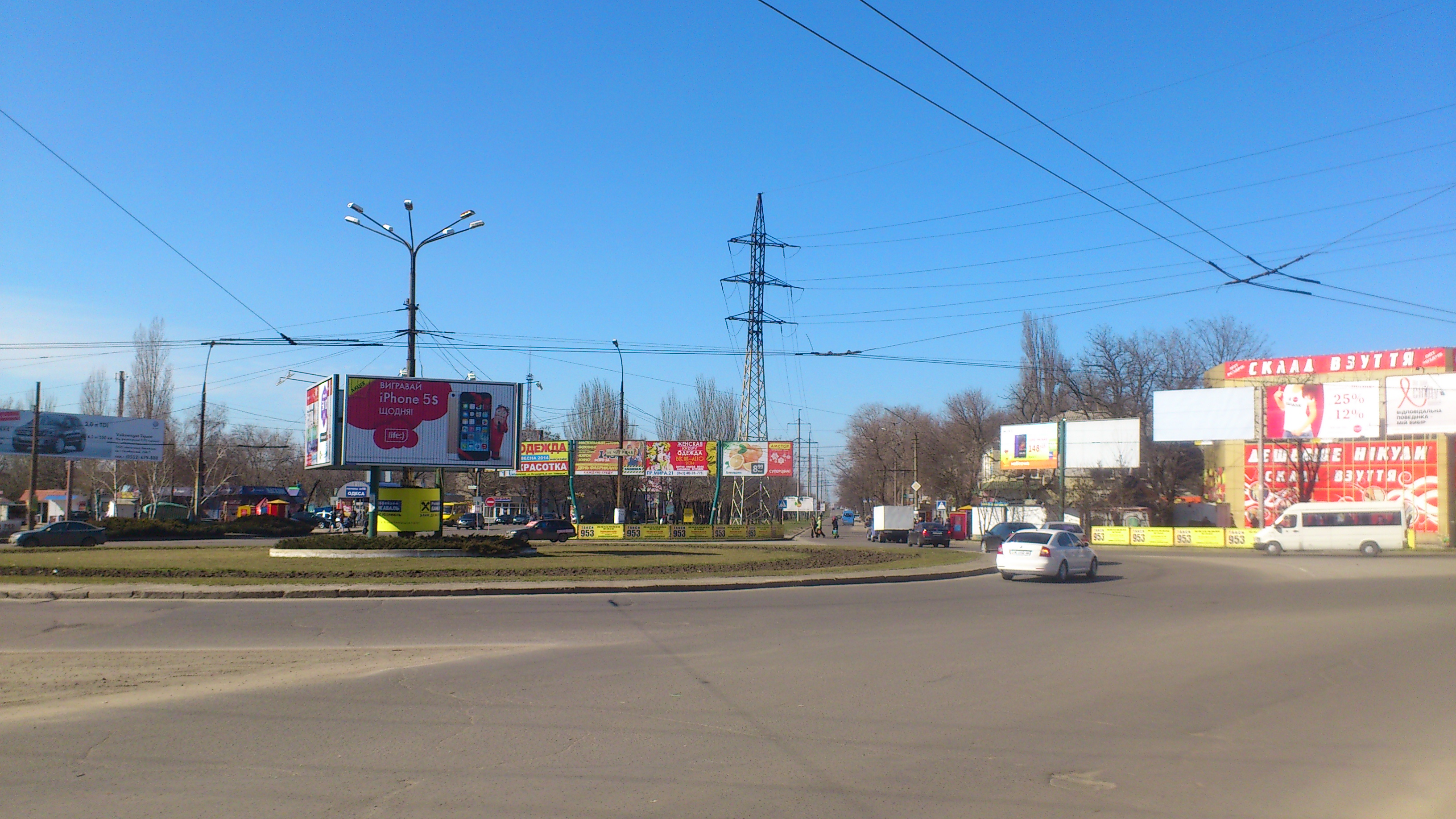 Кільце у Миколаєві на перетині проспекту Миру (на передньому плані, Богоявленського проспекту (зліва та справа) і вулиці Чигрина (на задньому плані)